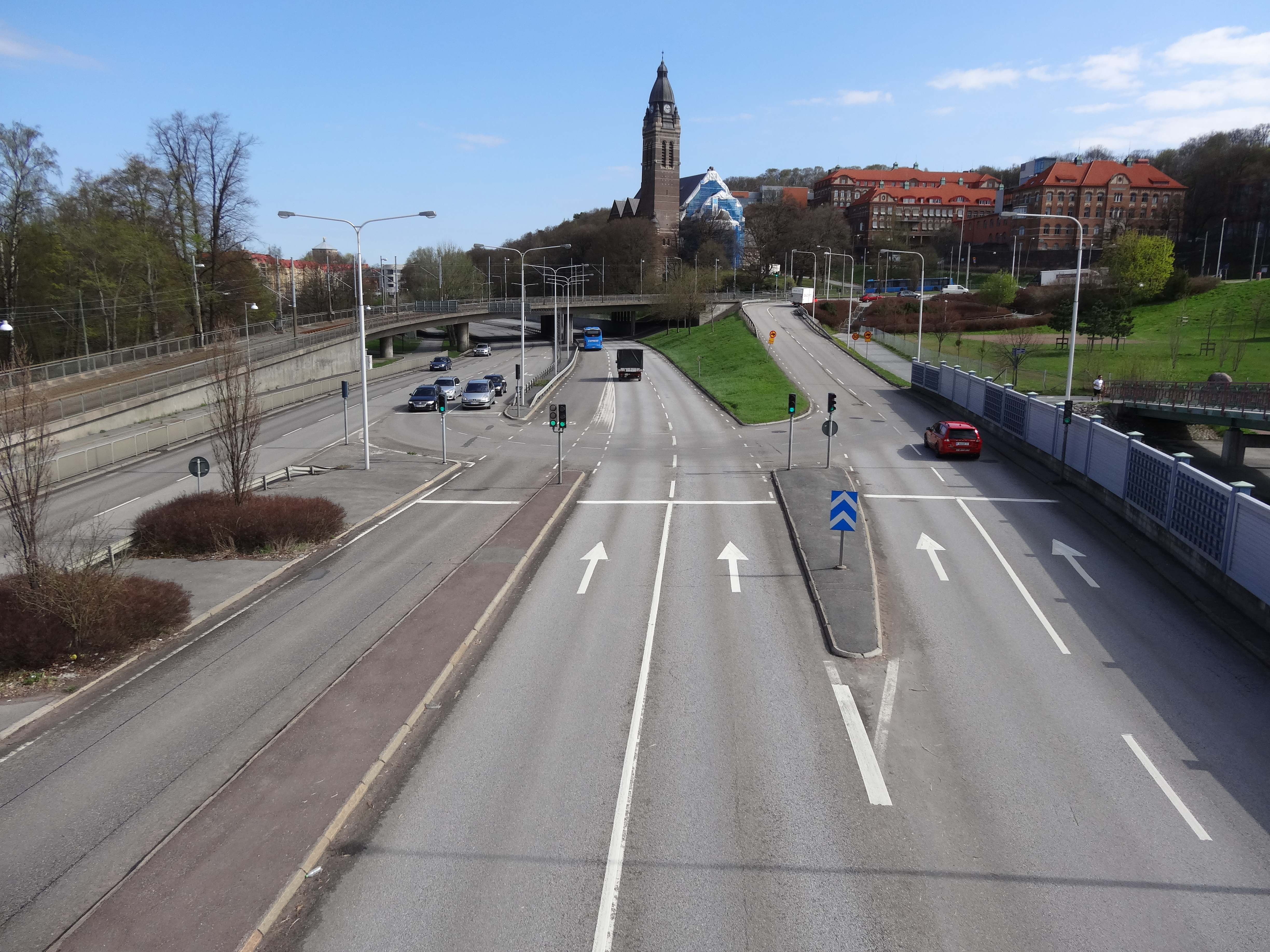 Dag Hammarskjöldsleden i Göteborg. Vy norrut mot Annedalsmotet från gångbron i höjd med Slottskogen.